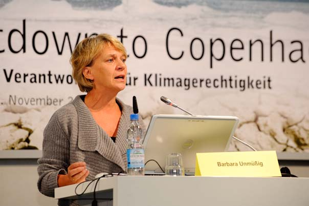 Barbara Unmüßig, Foto: Stephan Röhl